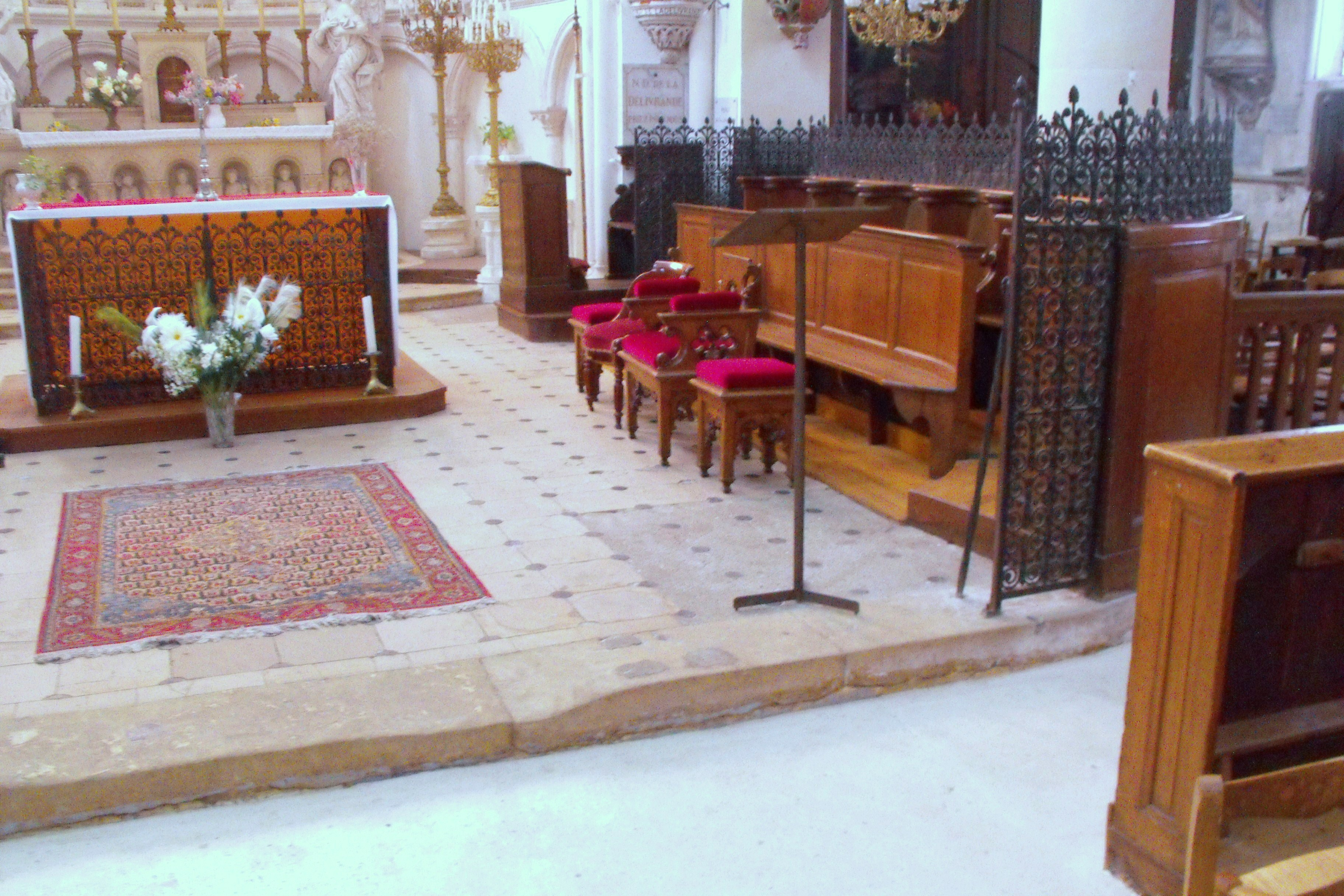 Choeur de l'église Notre-Dame de la Nativité à Sassetôt-le-Mauconduit, Seine-Maritime